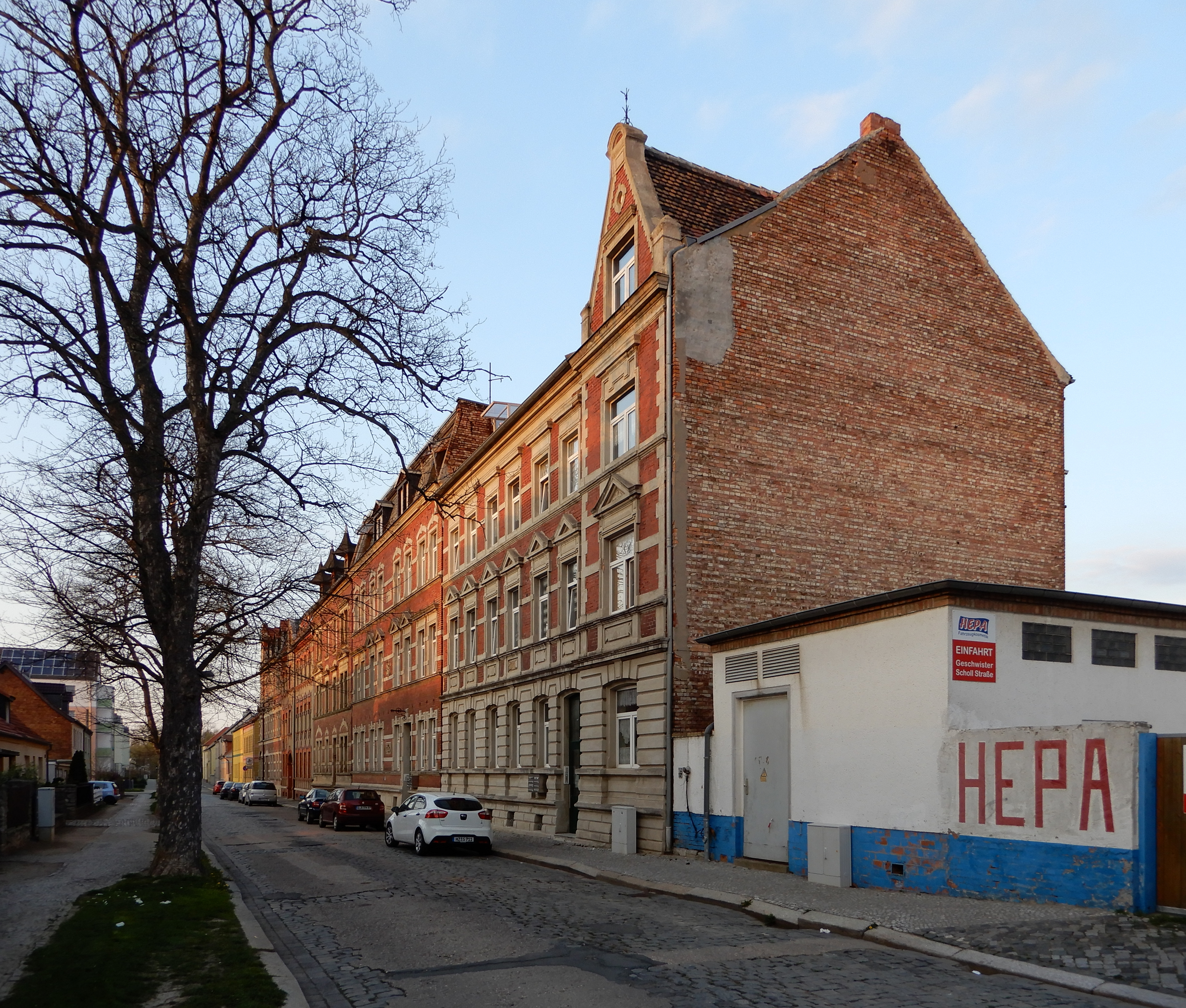 Gebäude in der Georgstraße 3-7 in Aschersleben